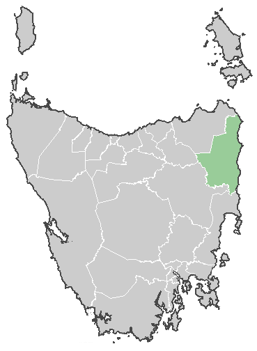 Break O'Day